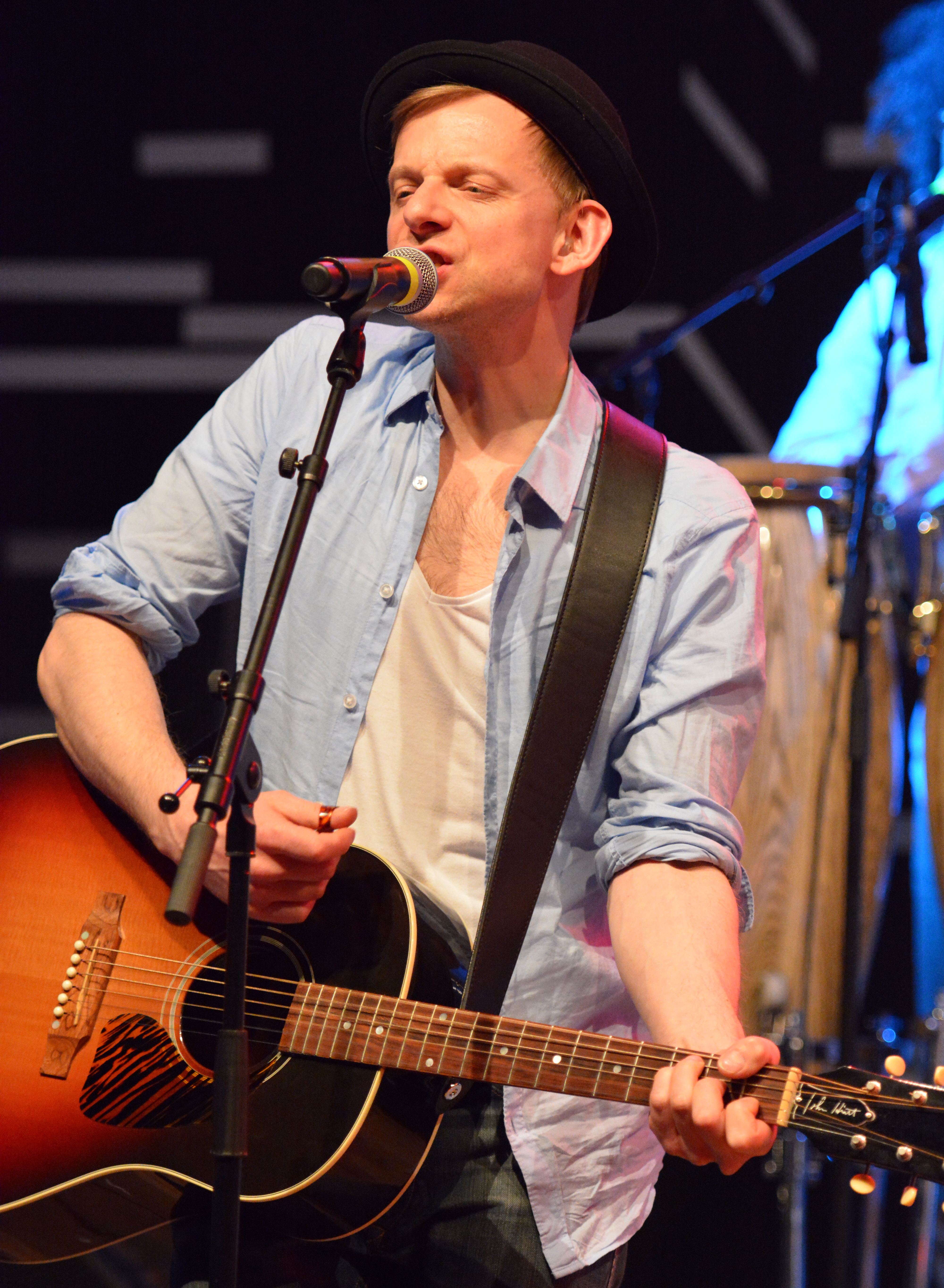 Dominik Decker von Marquess bei Appen musiziert 2014